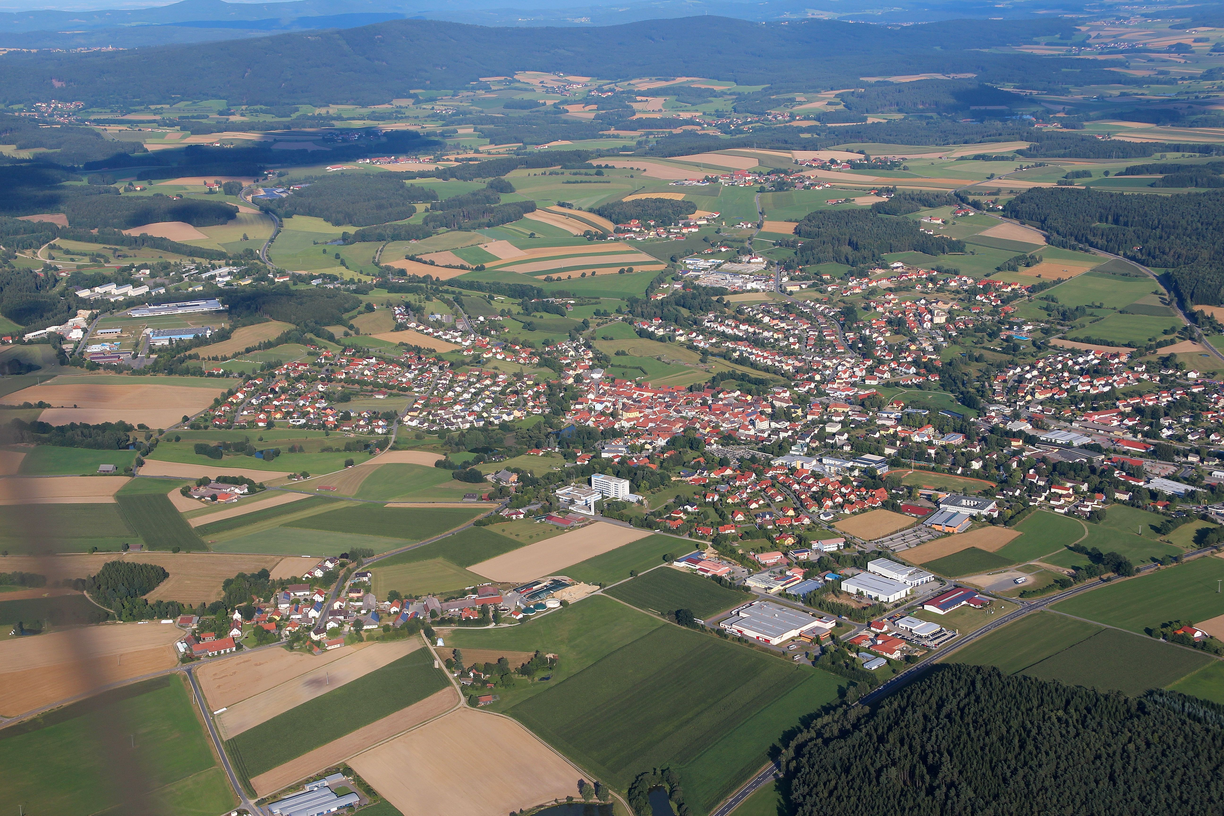 Oberviechtach, am linken Bildrand ist Hof zu sehen